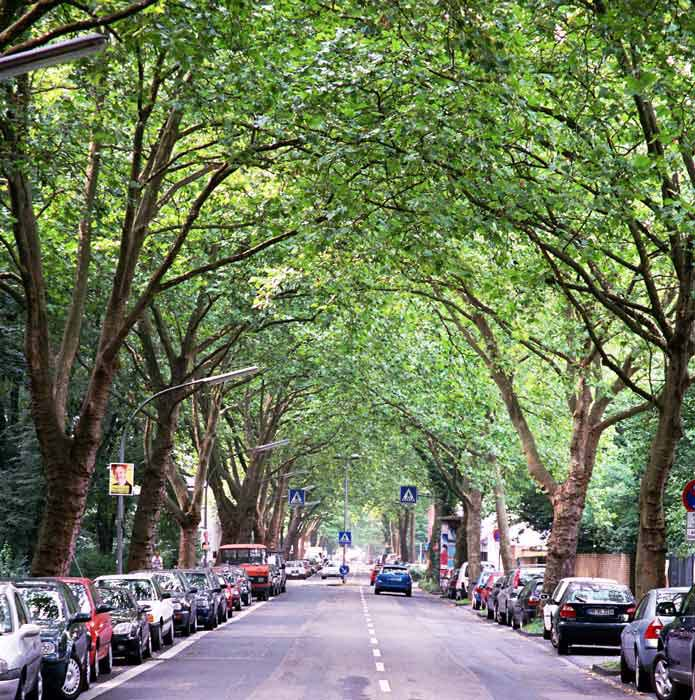 Neuenhöfer Allee Köln-Sülz